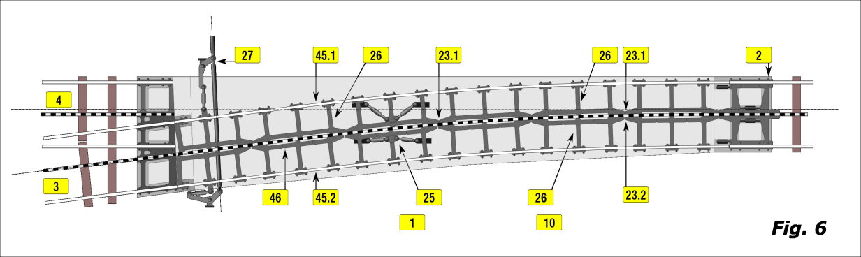 GLEISWEICHE / TRACK POINTS / AIGUILLAGE: RIGI-VTW 2000 Europäisches Patentamt / EUROPÄISCHE PATENTSCHRIFT / EP 1 214 473 B1 / 20.07.2005 Patentblatt 2005/29 / Anmeldenummer: 00958083.8 Anmeldetag: 18.09.2000 / Int Cl.7: E01B 25/06 / Internationale Anmeldenummer: PCT/CH2000/000502 Internationale Veröffentlichungsnummer: WO 2001/021894 (29.03.2001 Gazette 2001/13)